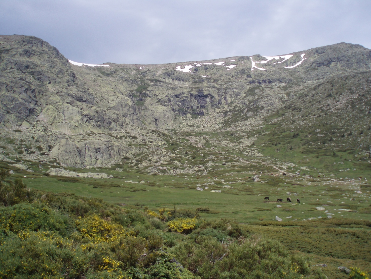 Circo glaciar de Peñalara, ubicado en la Comunidad de Madrid (España).